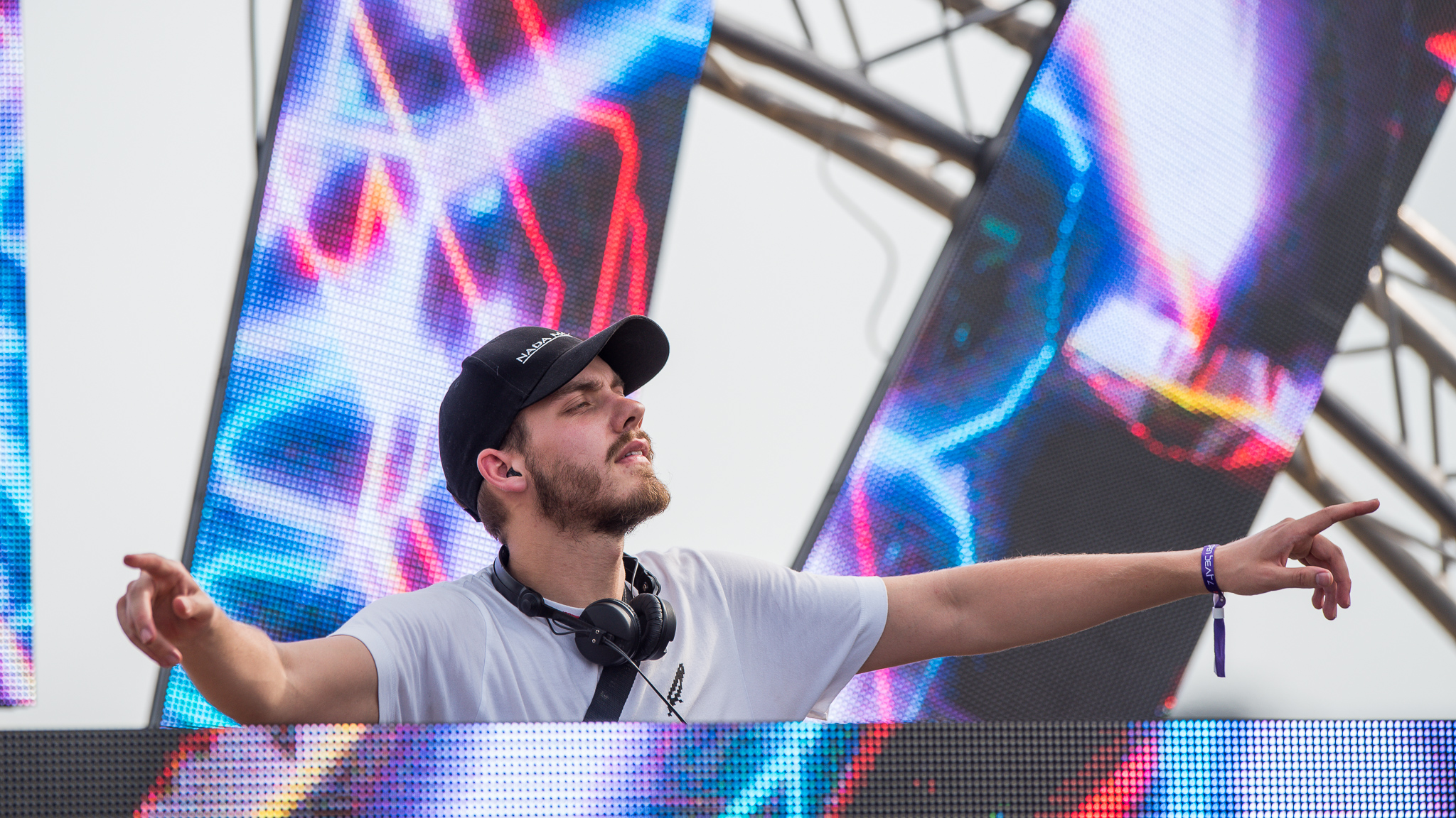 3rd Stage,Festival,Konzert,Livekonzert,Livemusik,Musik,Open Beatz 2016,San Holo,Sander van Dijck